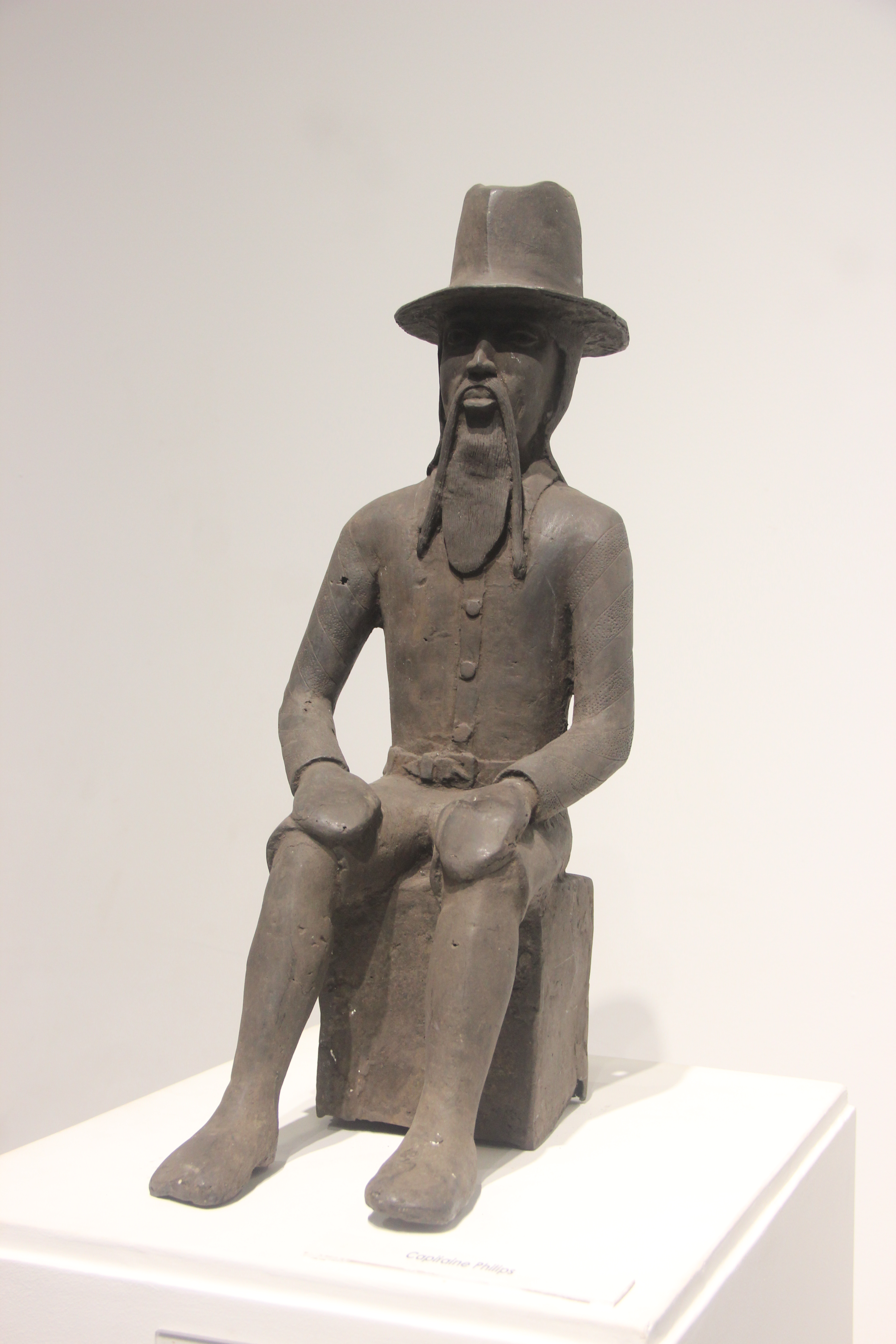 Statue de James Robert Phillips (Q28793883)